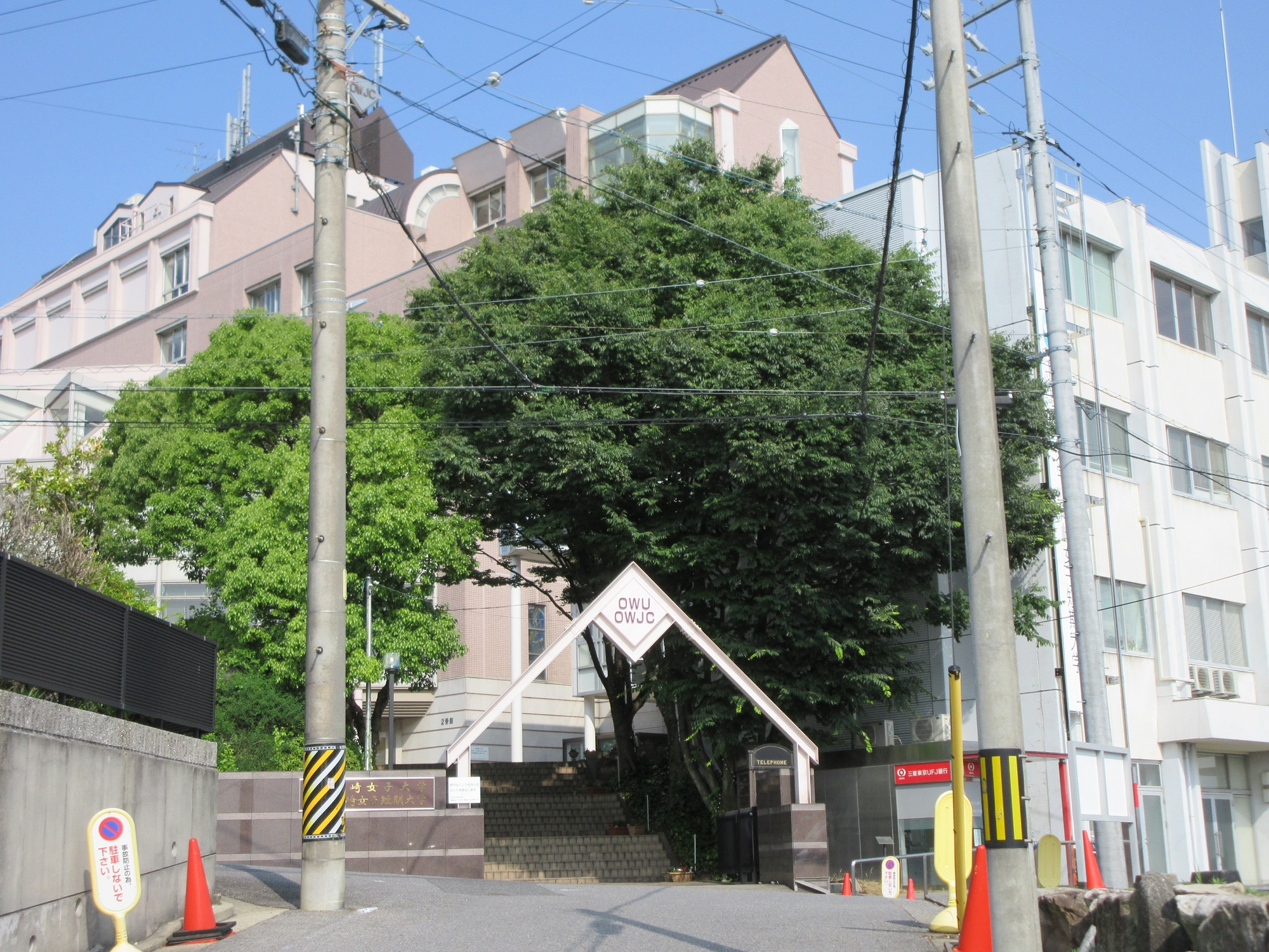 岡崎女子大学（岡崎市中町）